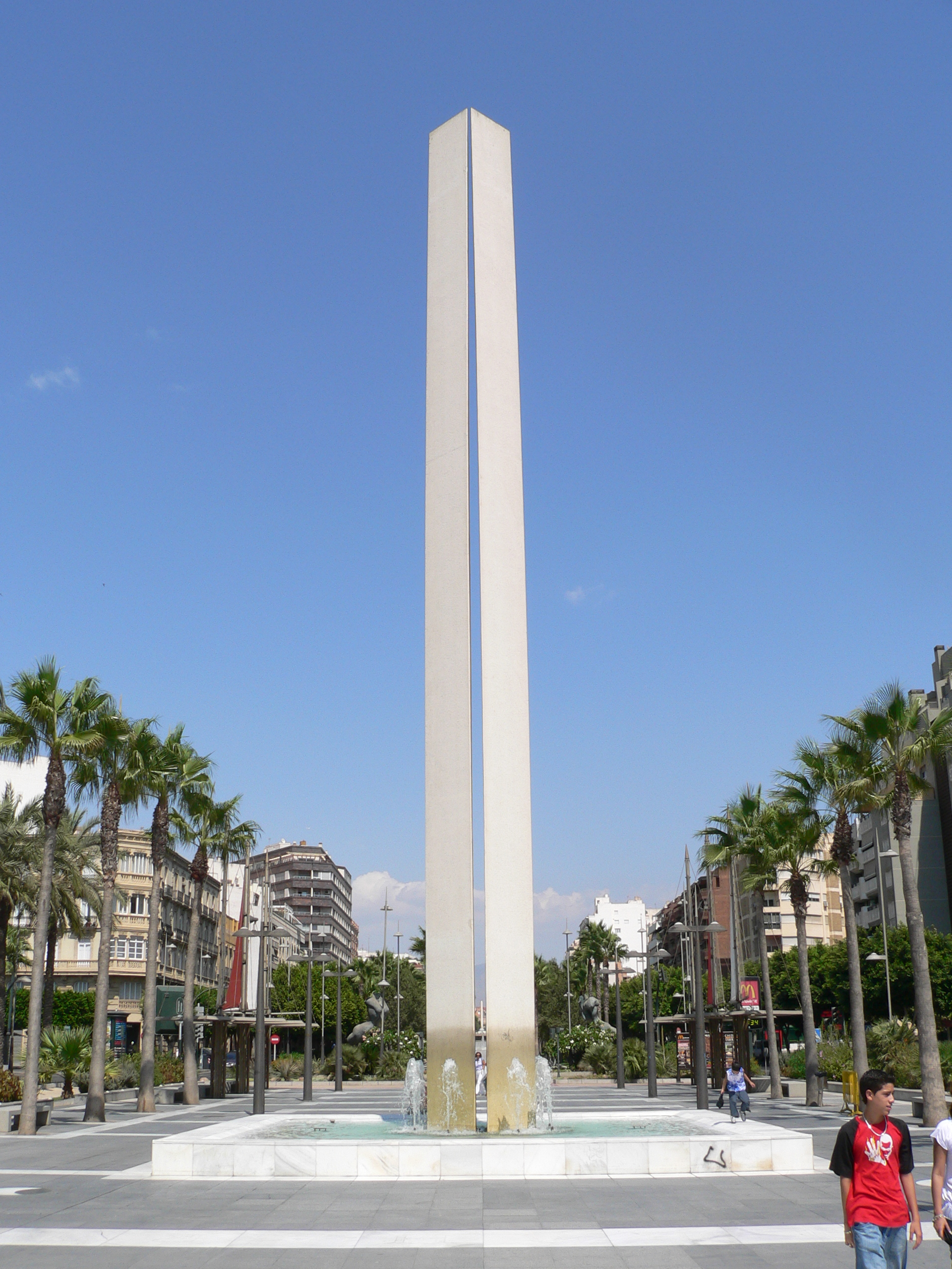 Estatua de la Caridad (Statue der Wohltätigkeit) in Almería